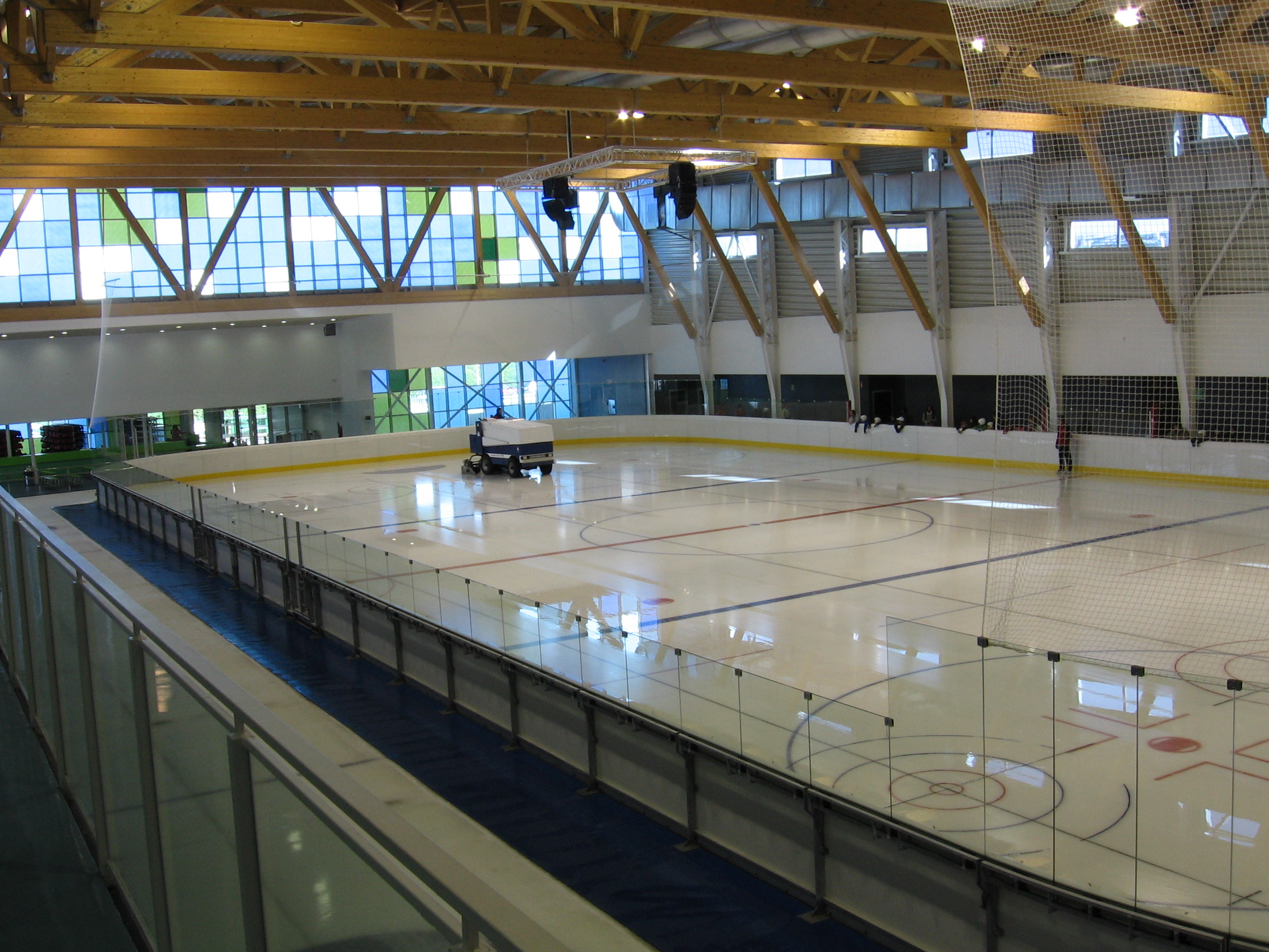 Pista de hielo en el centro deportivo del Baskonia, Salburua, Vitoria-Gasteiz, Álava, País Vasco, España